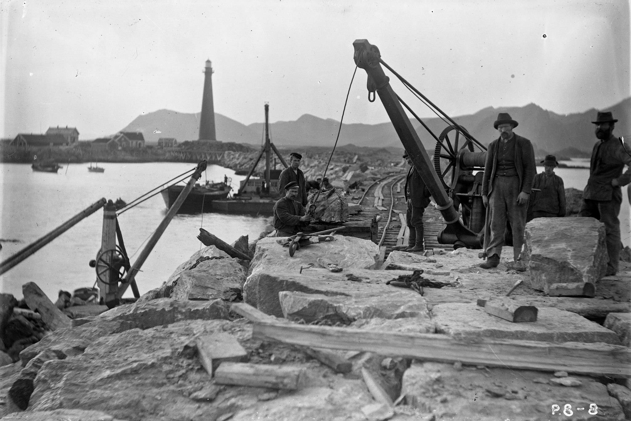 Leif Andresen er avdelingsdirektør i Seksjon for bygningsdrift og utbygging, og er førstemann ut i 2013 til å vise frem sitt favorittbilde fra arkivene. "Omkring forrige århundreskifte foregikk det en storstilt havneutbygging langs hele vår lange kyst. Dette bildet fra 1902 viser byggingen av en molo eller jeté på Andenes i Nordland. Den er i ferd med å ferdigstilles, og arbeiderne holder på legge jetéens krone. En trallebane ble brukt til å transportere steinene ut over moloen, og de ble heist på plass med en liten hånddreven kran. Ellers ser vi at det ble brukt tradisjonelle håndredskaper som slegge, meisel og spett for å få de store steinene ordentlig på plass. Mannen som kikker fram under kranbommen er kledd litt annerledes enn de andre på bildet og er sannsynligvis formann eller oppsynsmann." Arkivreferanse: S-1604 Havnedirektoratet. Serie Ua, glassplatenegativer